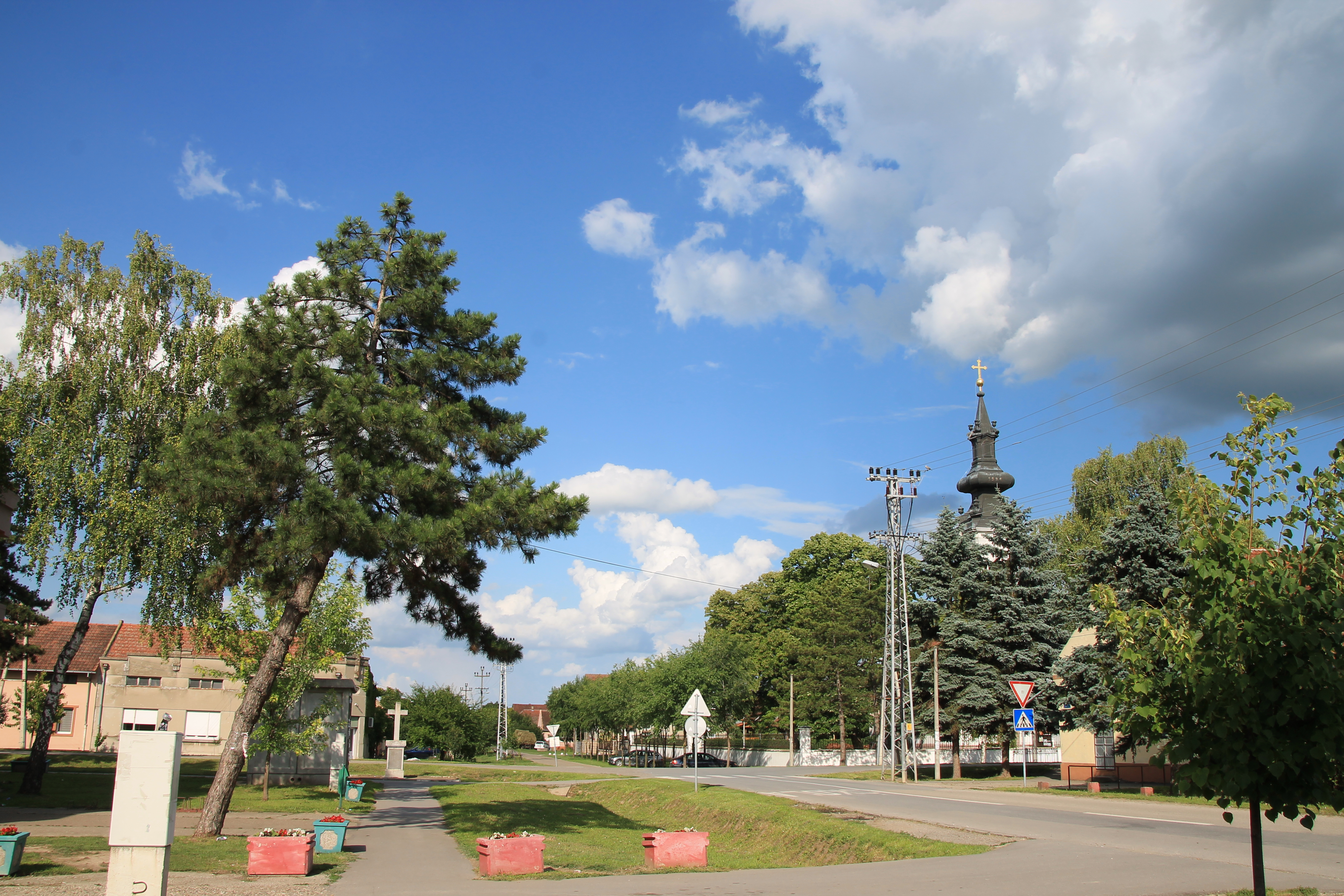 Silbaš